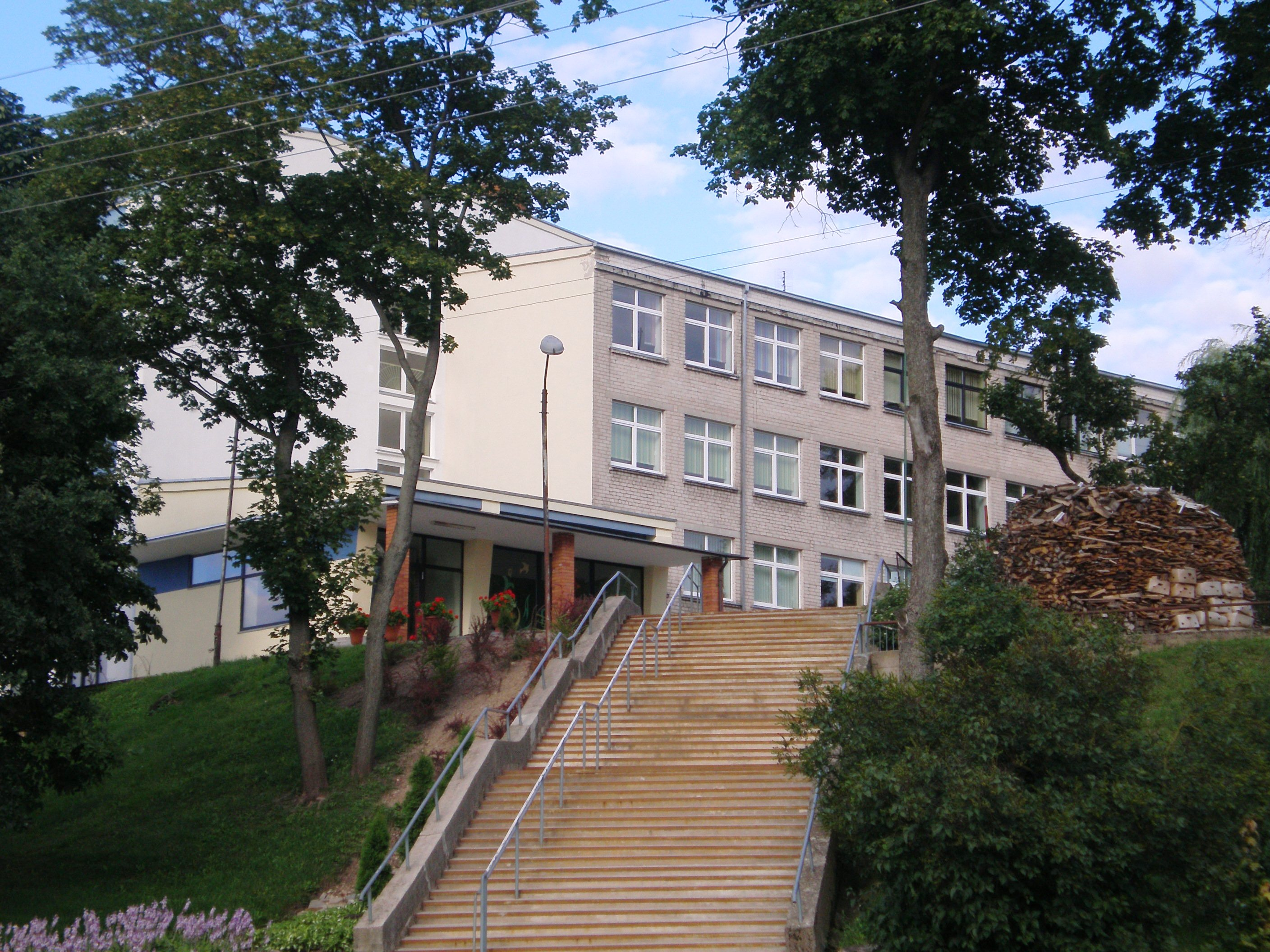 "Paukštelis" school in Kėdainiai